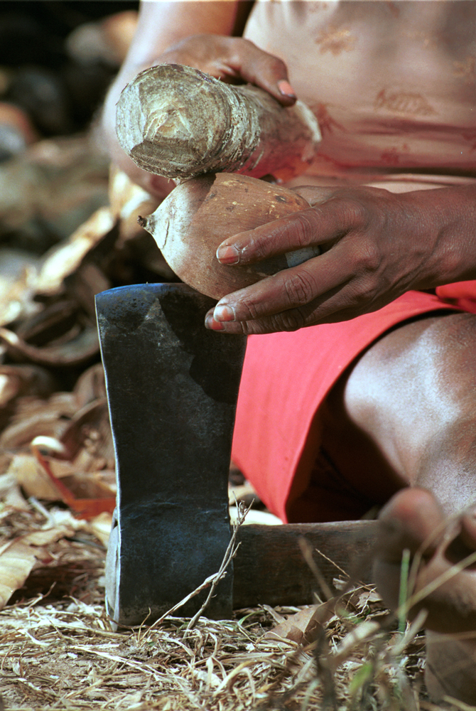 Somente Mulheres desenvolvem o ofício de quebrar côco babaçu na floresta